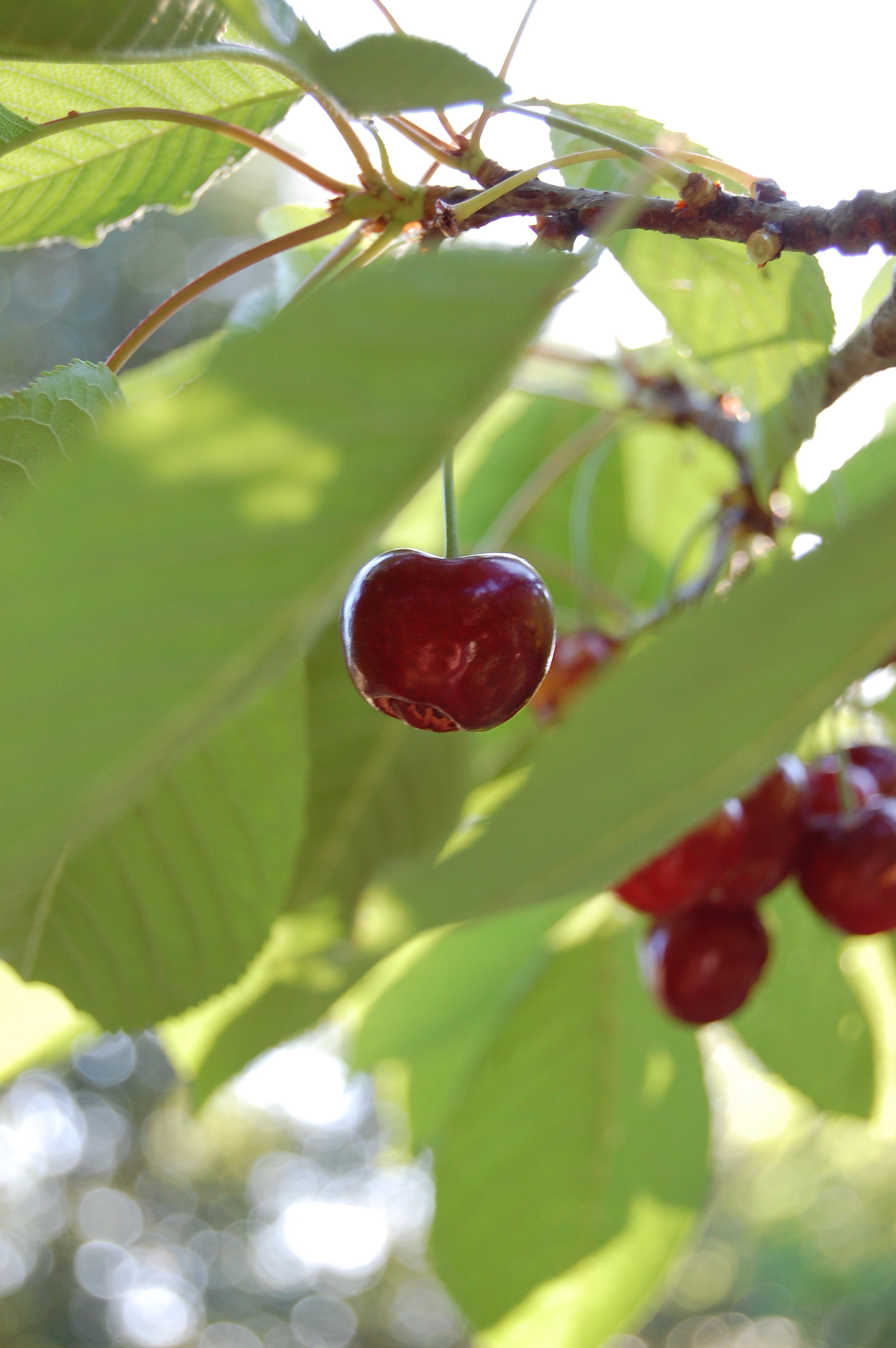 Cerise mure